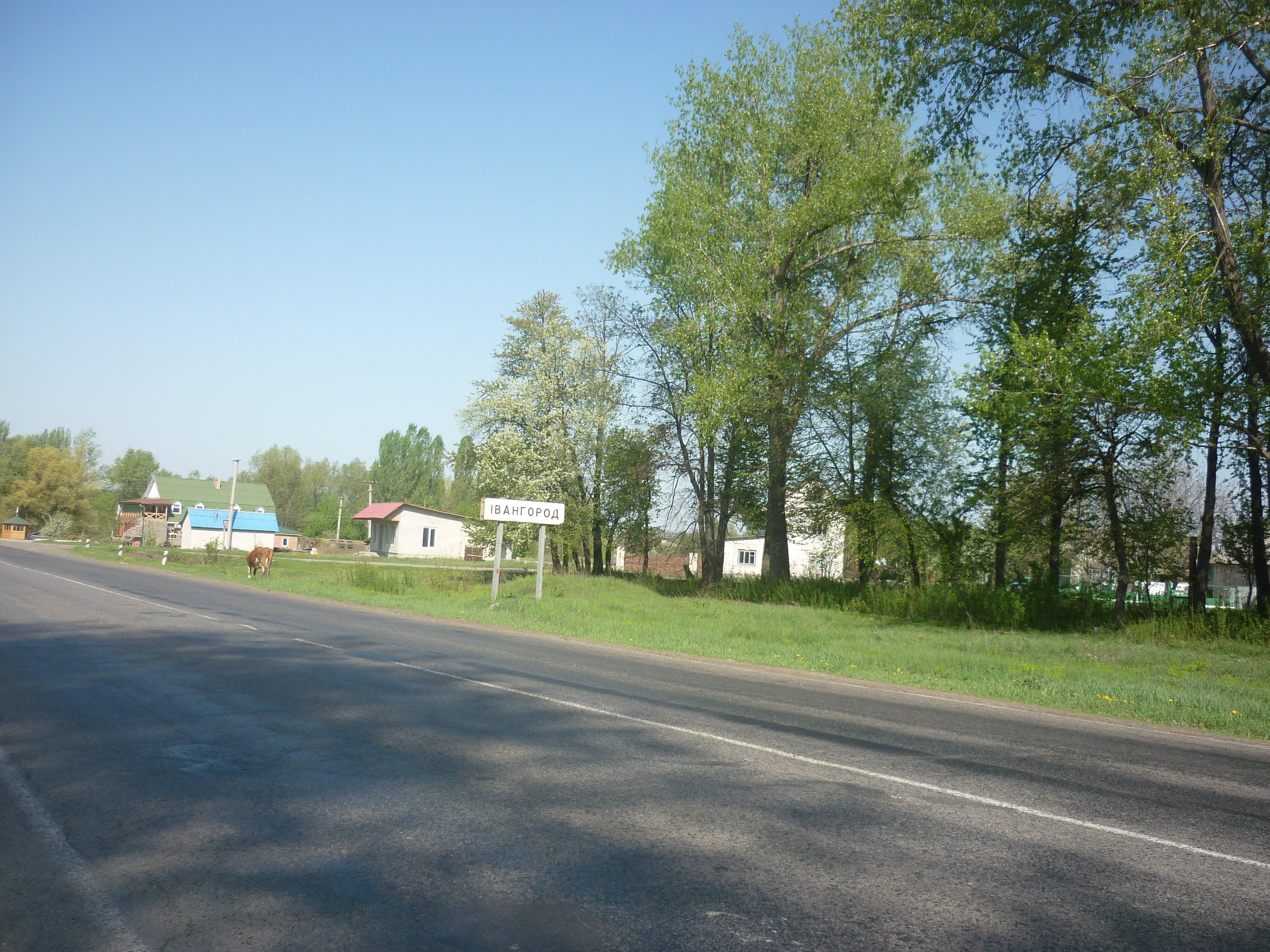 Село Івангород Христинівського району. В'їзд з боку Умані